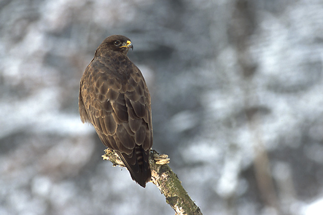 Buteo buteo